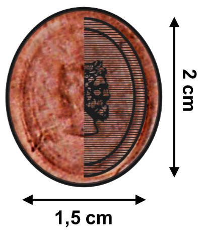 Sceau Ellebodius (1576)